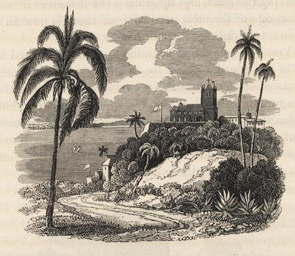 Igreja e Convento de Santo Antônio da Barra - Salvador Bahia, por Maria Graham em 1823